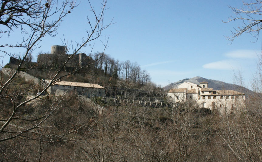 Il complesso del Monte a Montella